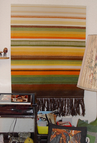 Rana